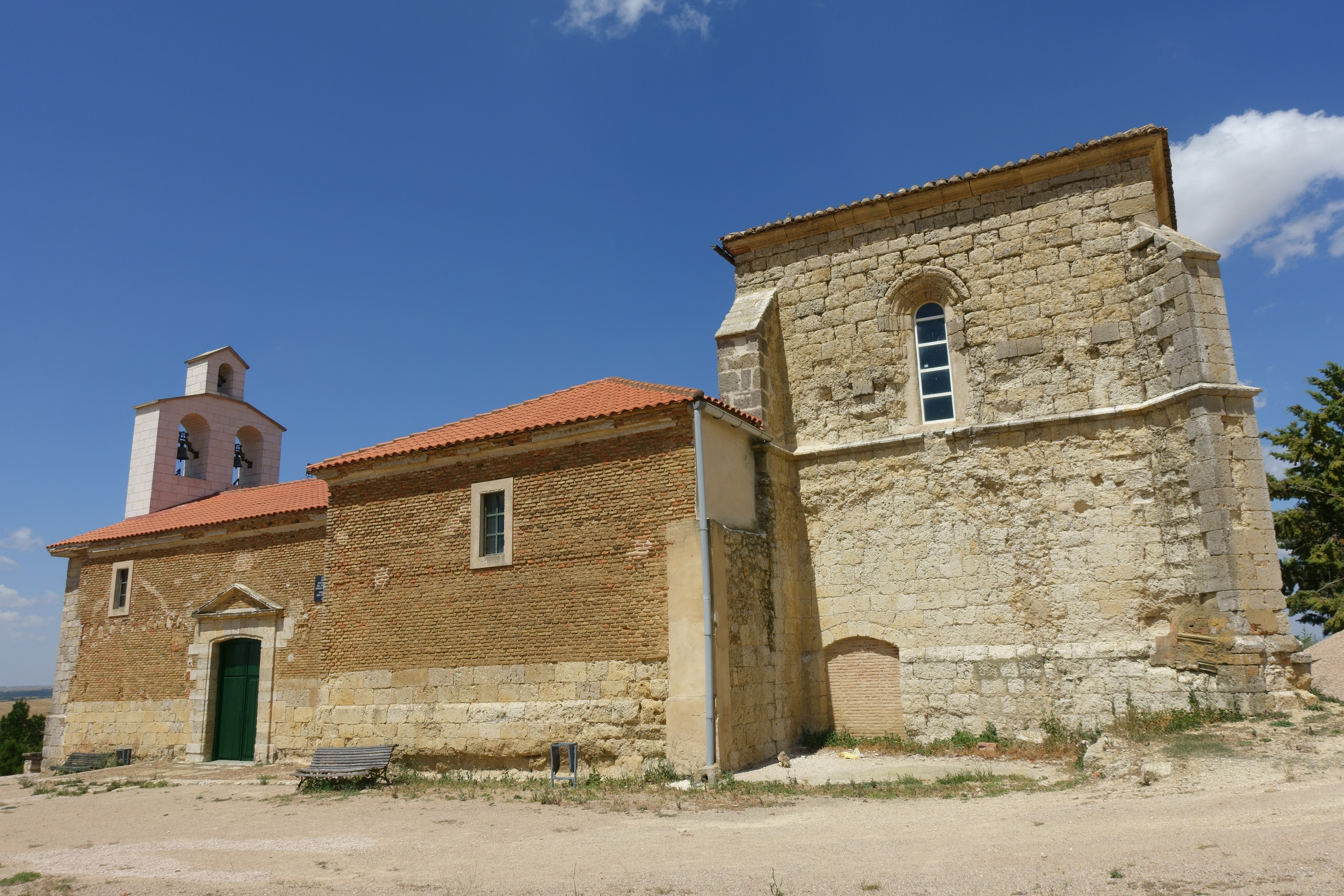 Iglesia de San Cristóbal, en Lomas (Palencia, España).